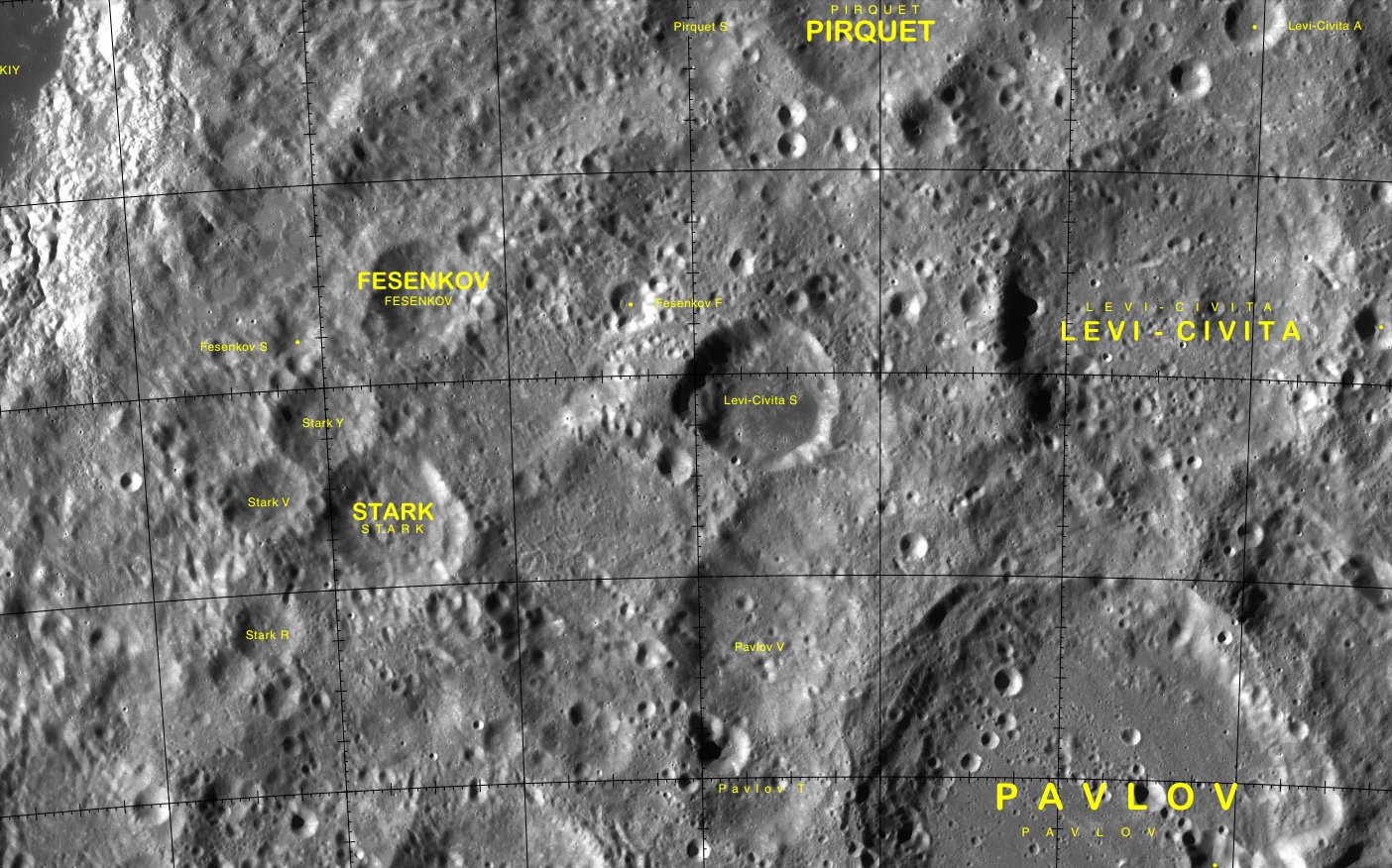 Cráter lunar Fesenkov. Localización. (Imagen LRO)